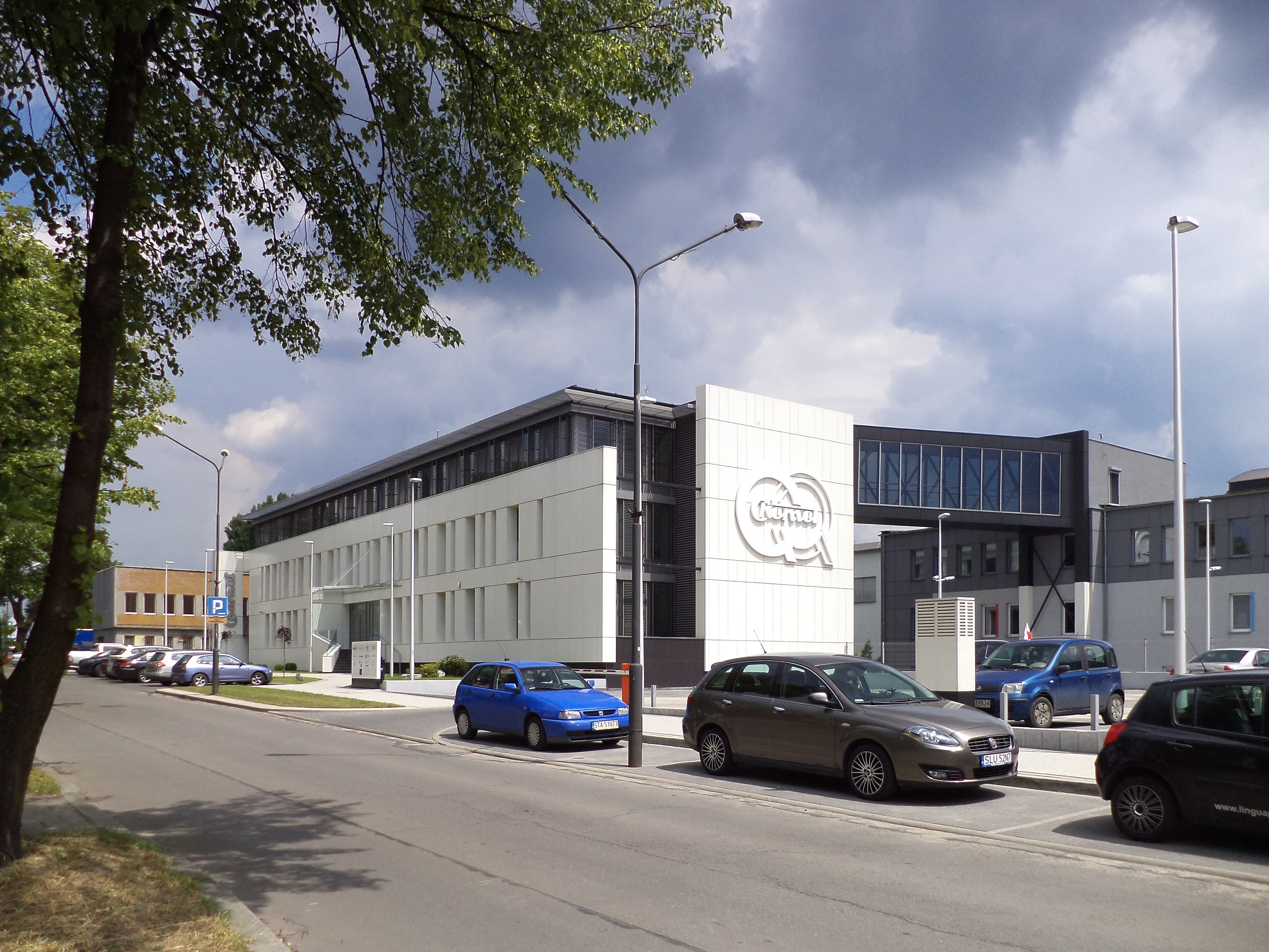 Chemet S.A. Zakłady aparatury chemicznej w Tarnowskich Górach